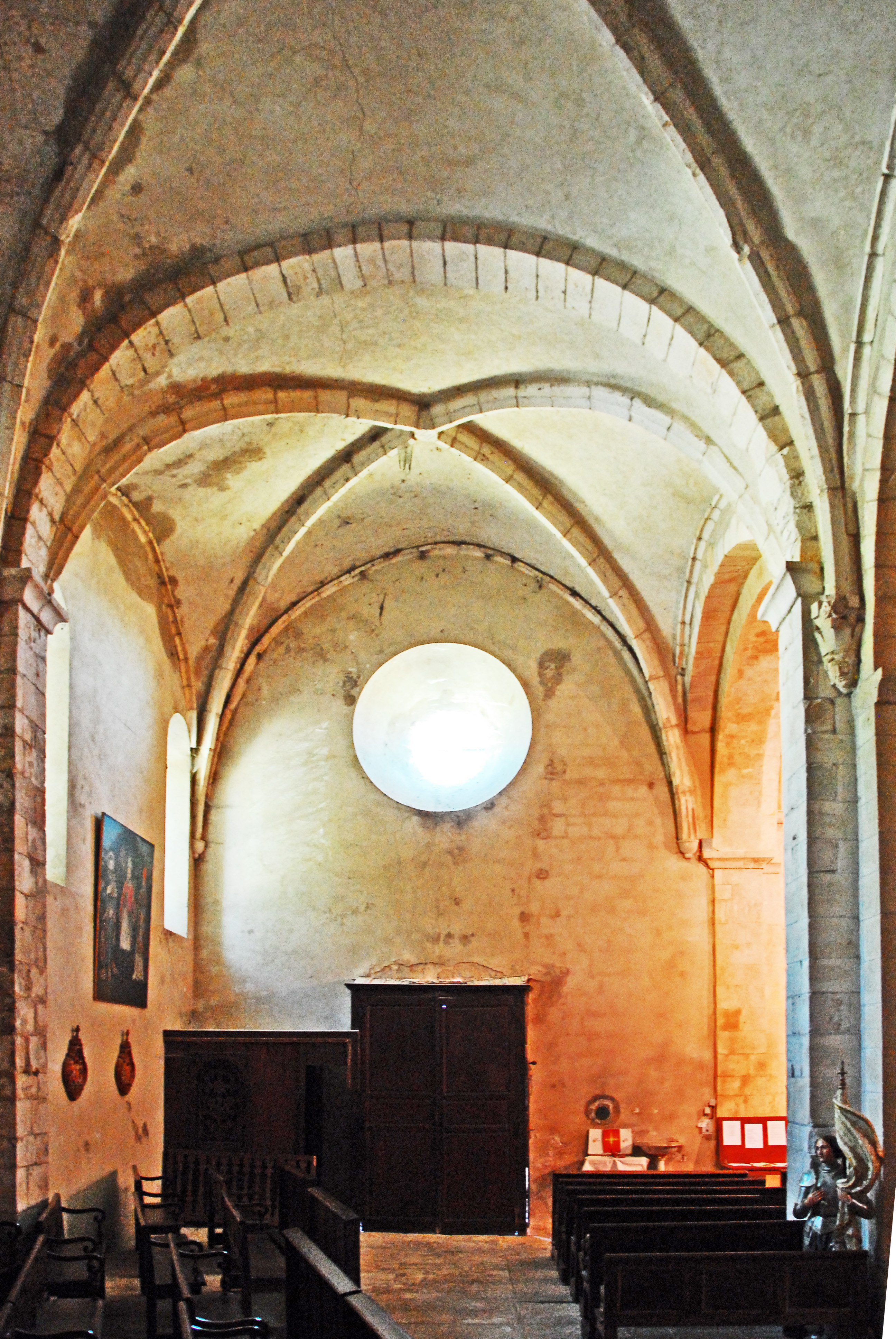 N-D et St-Christophe de St-Christol, Seitenschiff zum Eingang